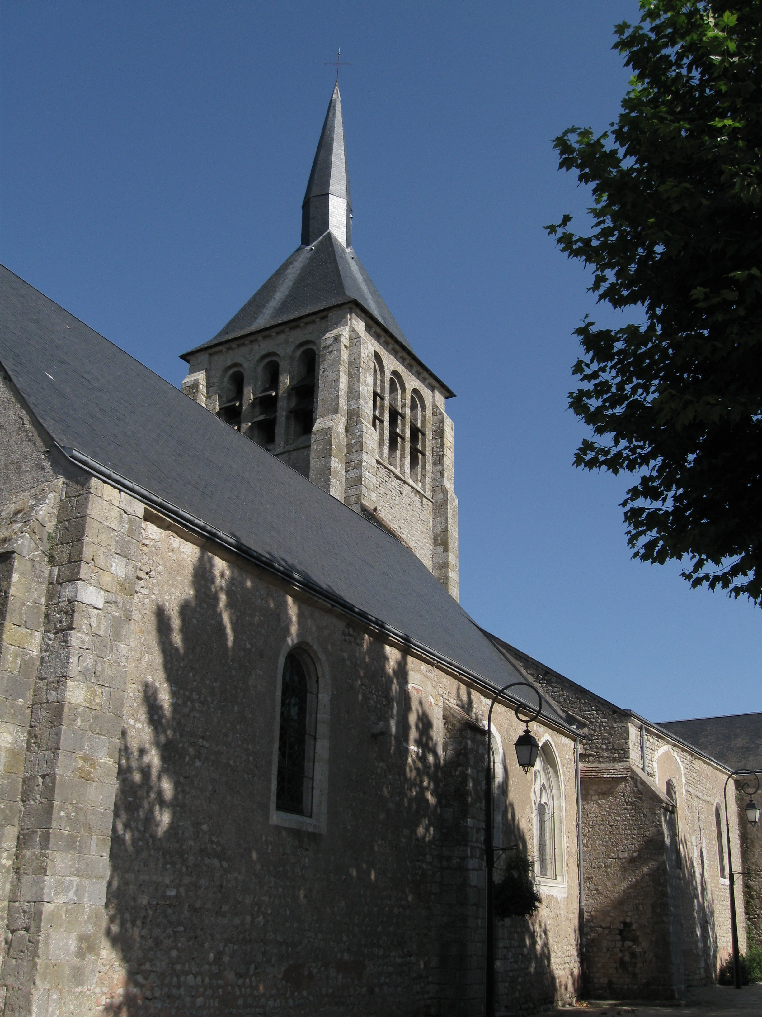 Église Saint-Martin, Mardié, Loiret, France